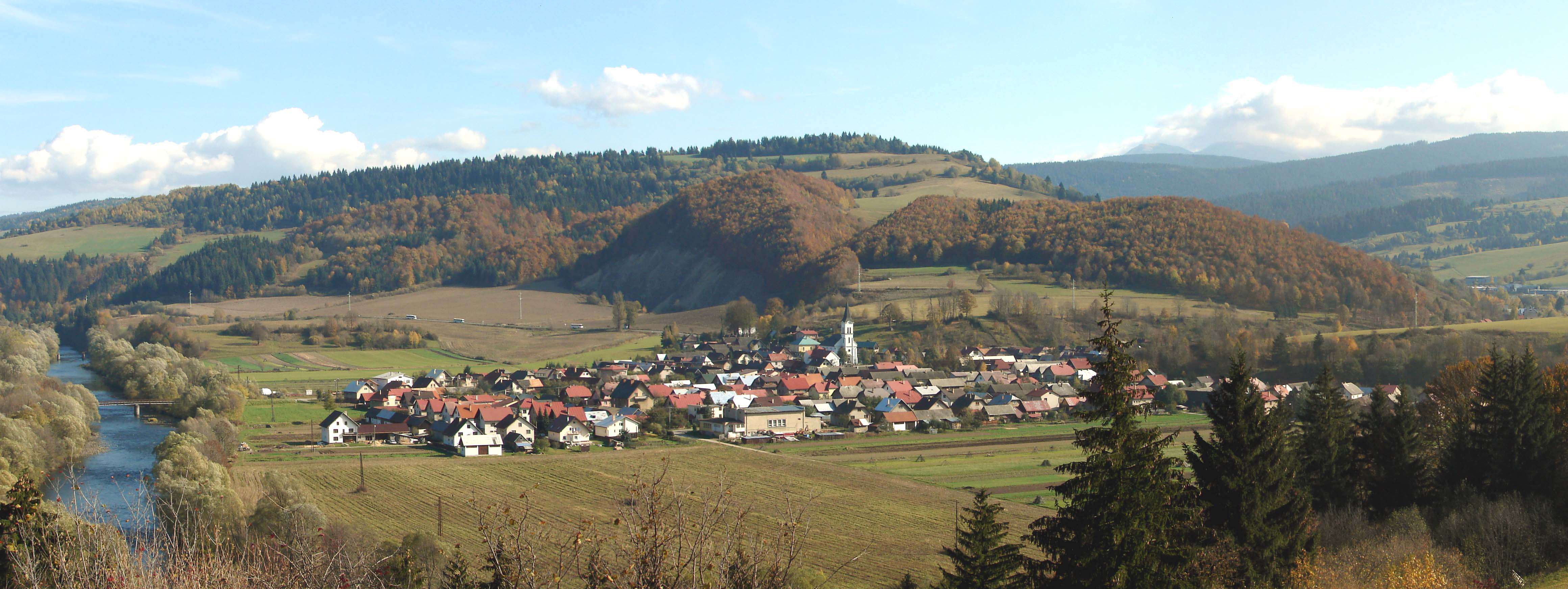 pohľad na Krivú